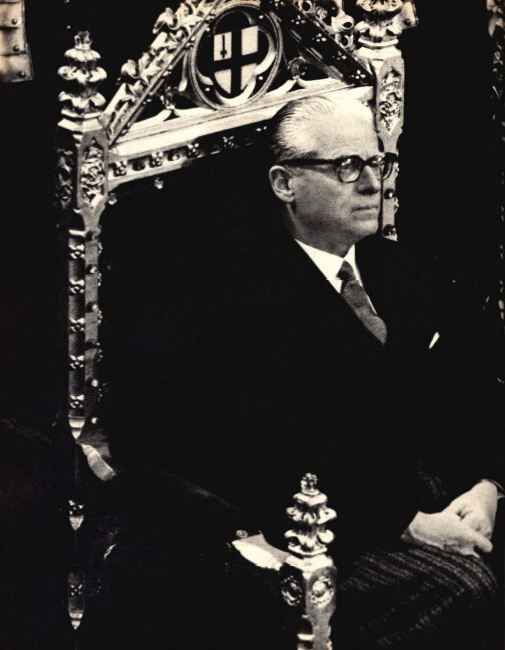 Italian politician Giovanni Gronchi